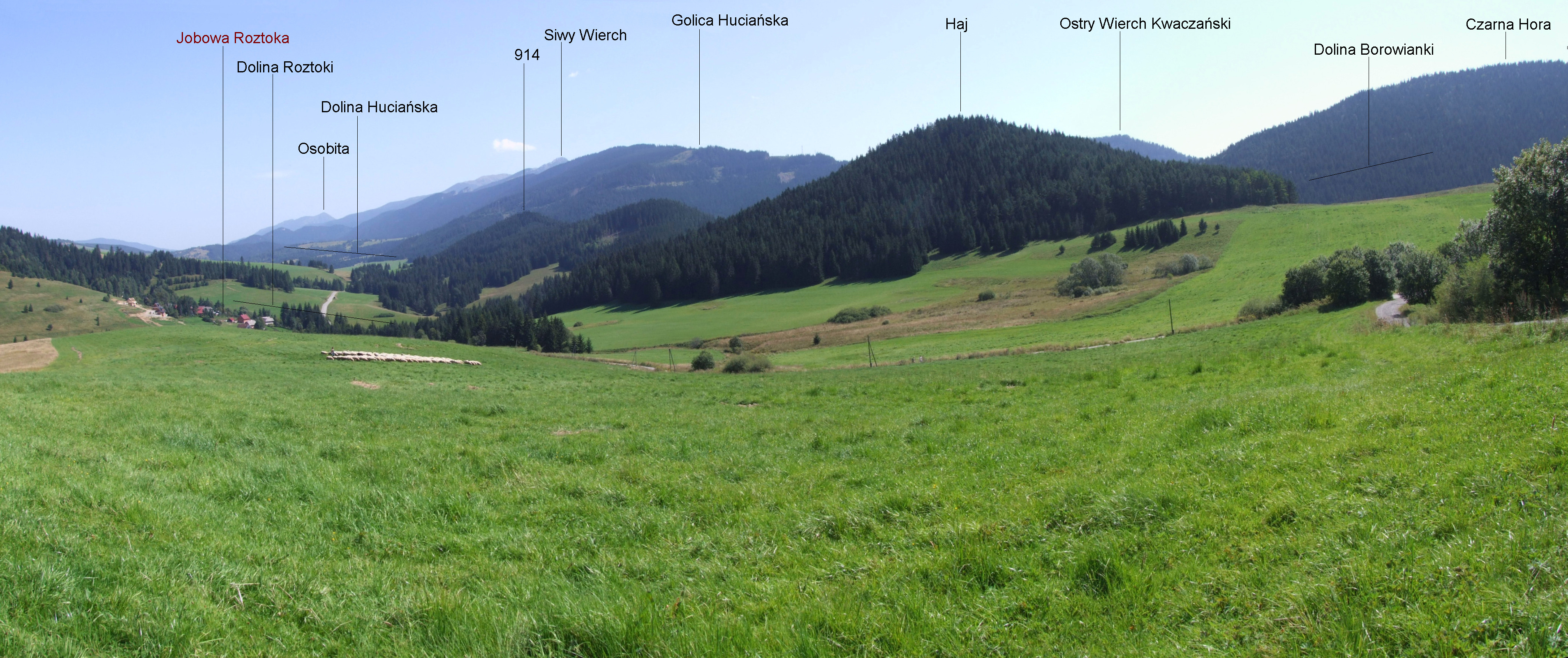 Widok z miejscowości Wielkie Borowe